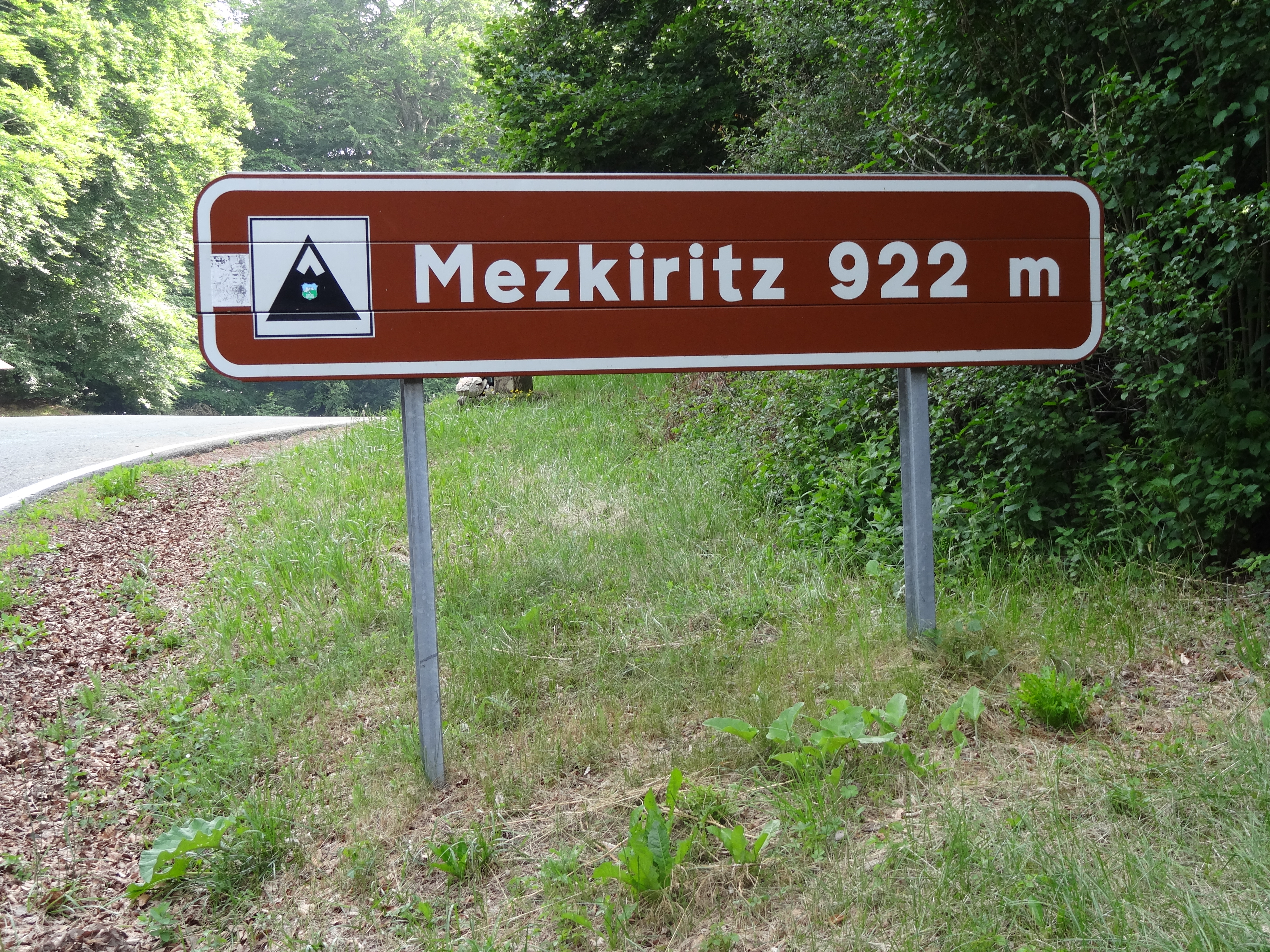 Mezquíriz (en euskera Mezkirtz)